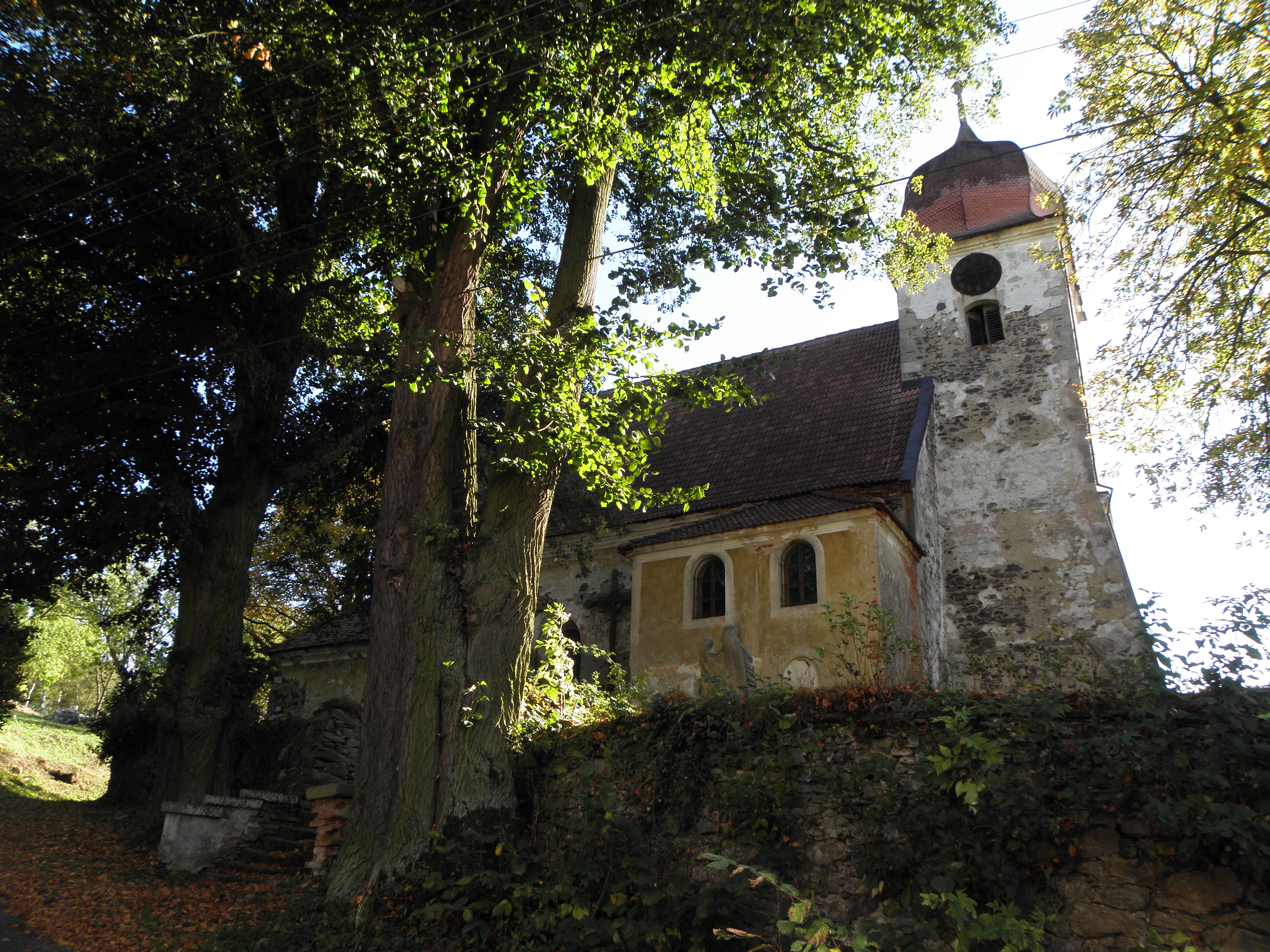 Kostel sv. Jiljí (Mělnice), Mělnice